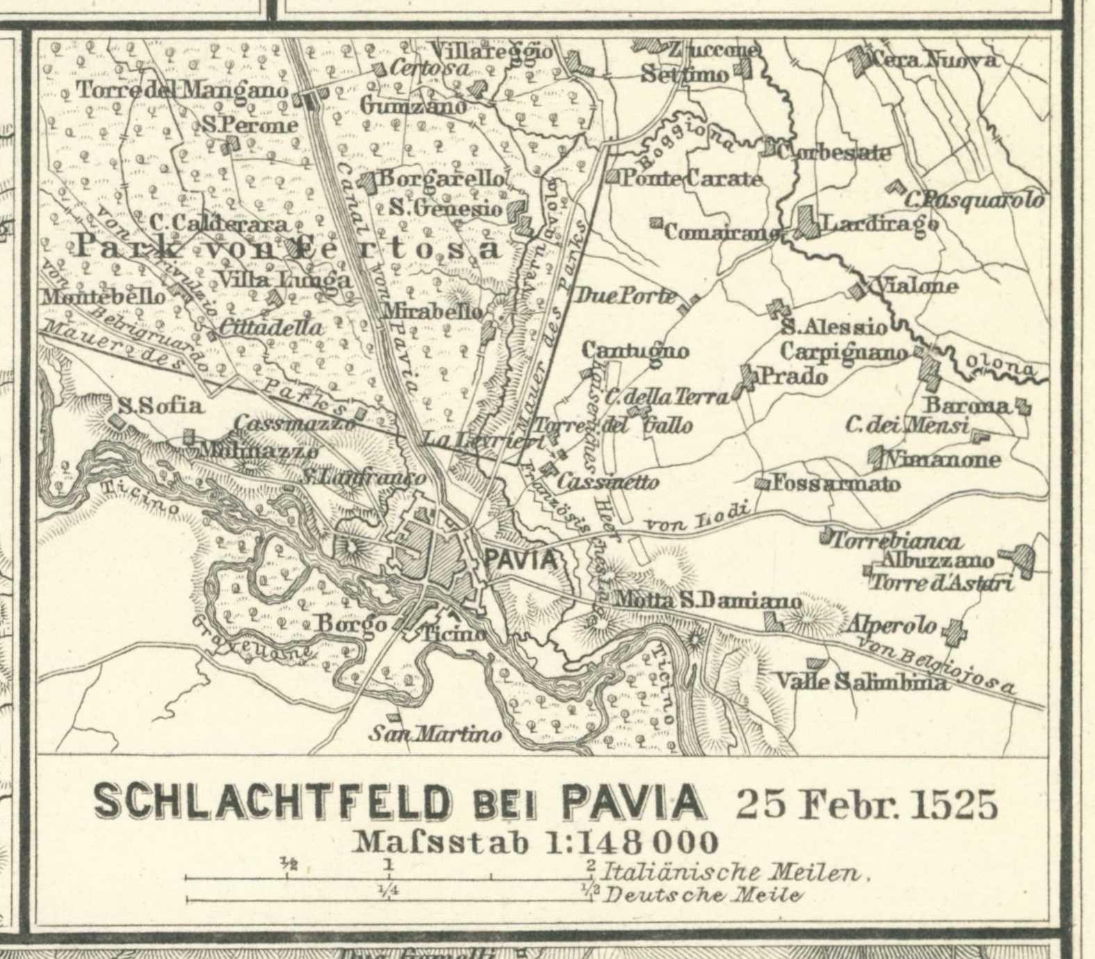 Schlachtfeld bei Pavia, 25. Februar 1525